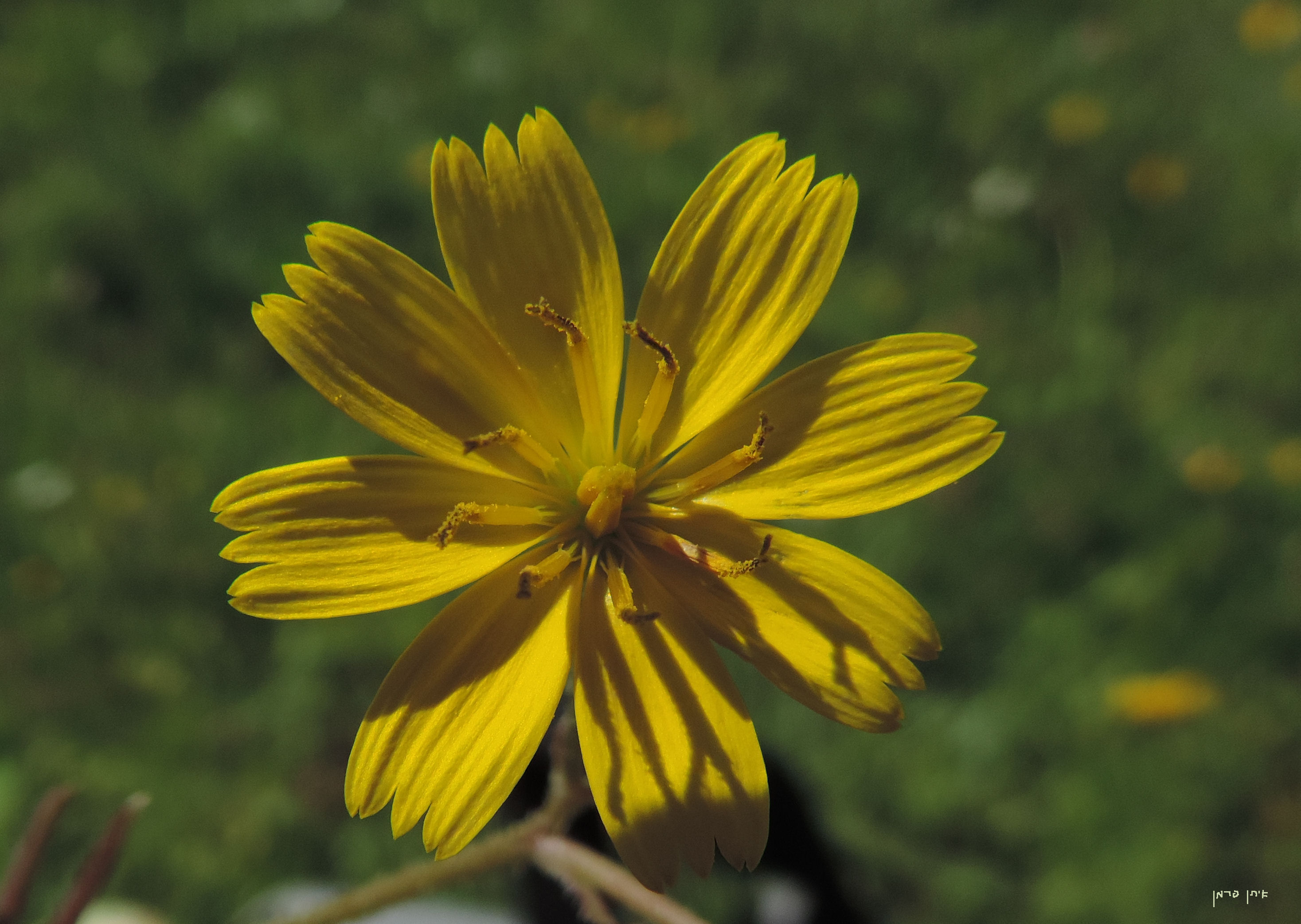 Rhagadiolus stellatus כוכבן מצוי